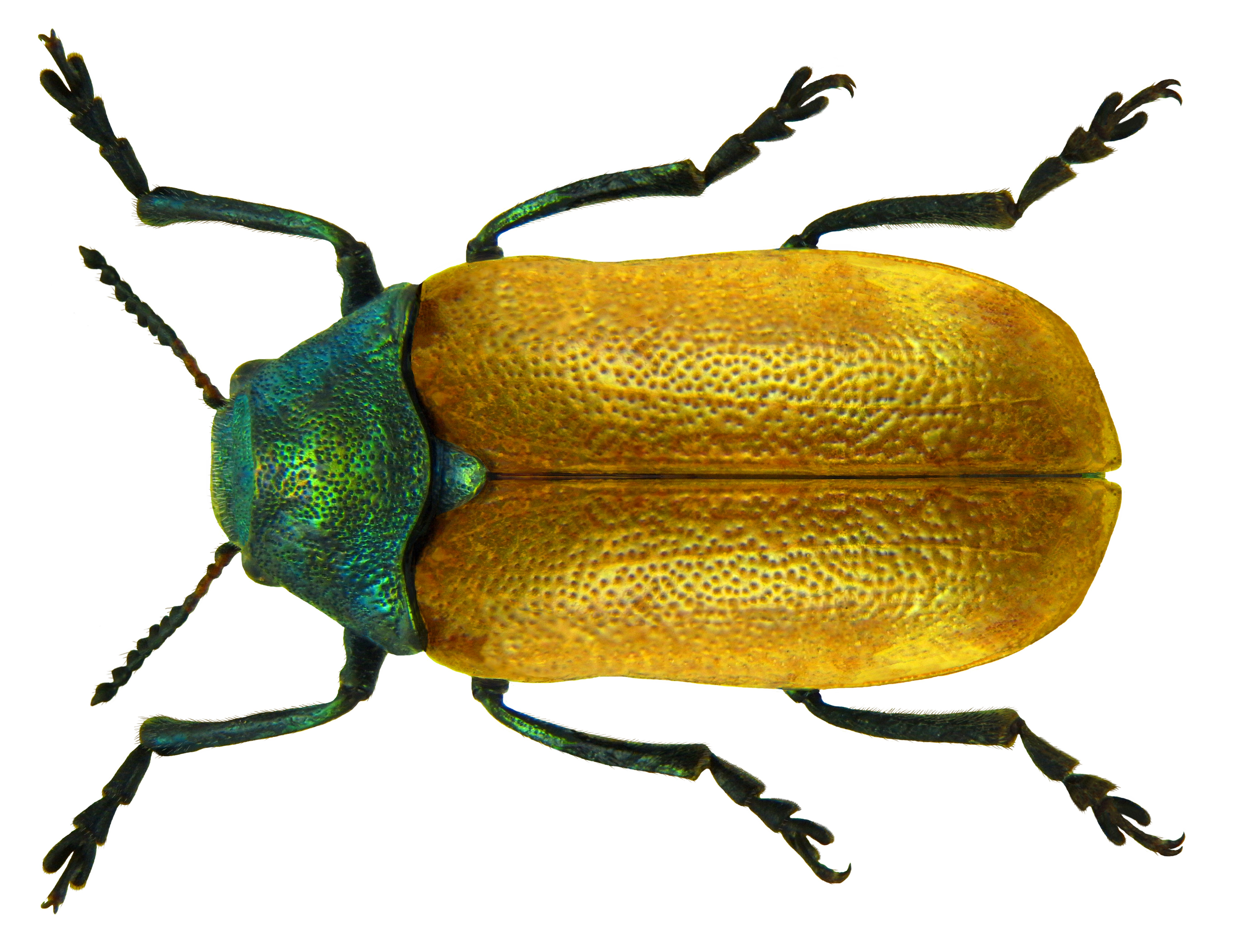 Labidostomis tridentata (Linné, 1758) Familie: Chrysomelidae Groesse: 6,5-8,5 mm Verbreitung: Europa Oekologie: an Corylus-, Betula-, Salix- und Spiraea-Arten Fundort: England leg. P.Harwood, 1957; Coll. Museum Oxford Photo: U.Schmidt, 2011